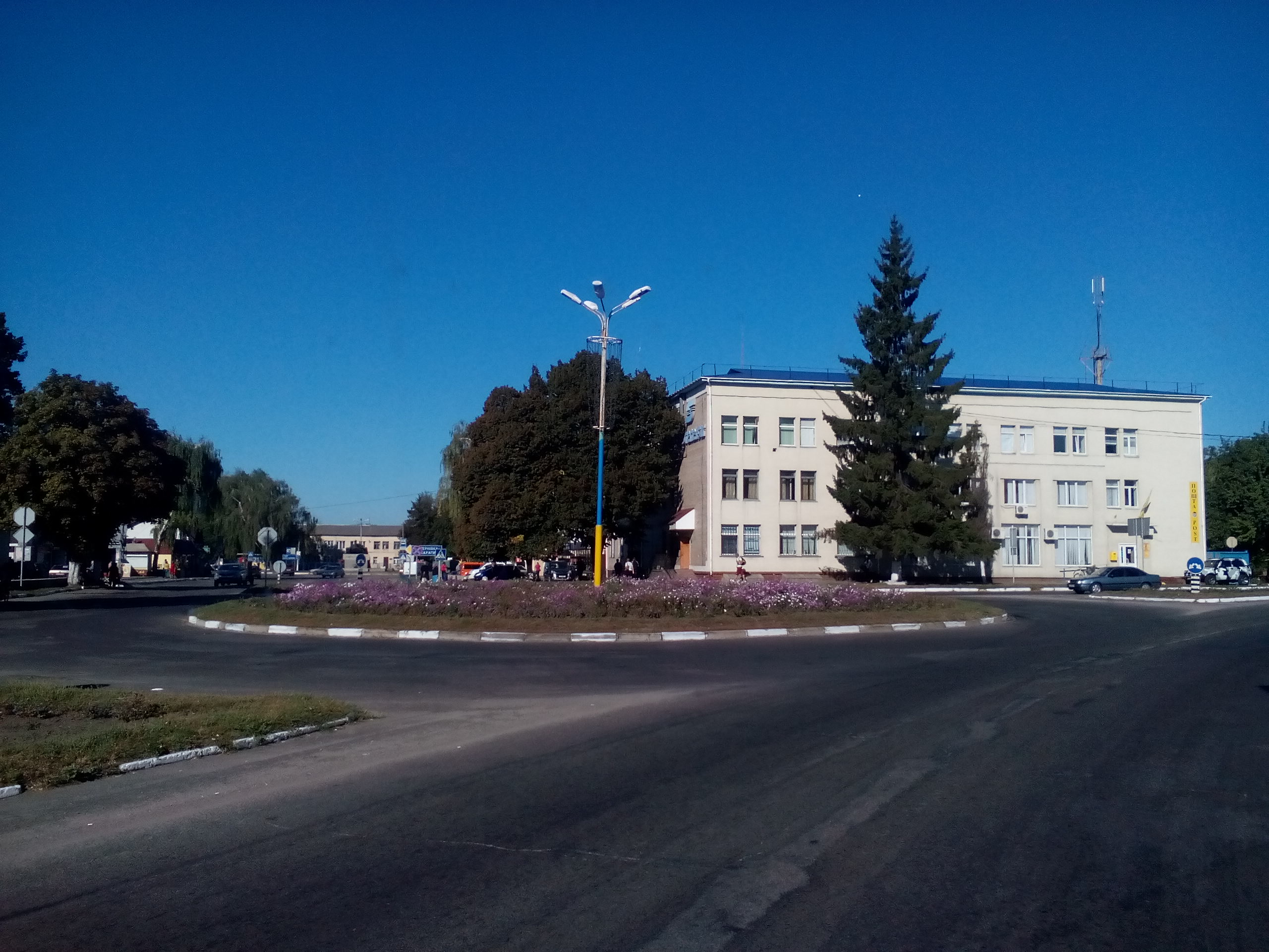 Місто Кагарлик Київської області